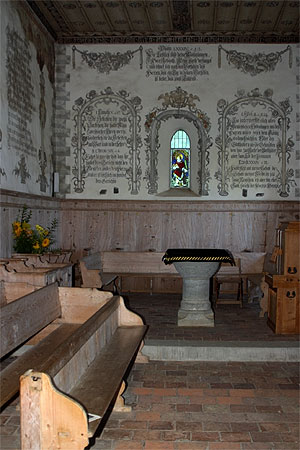 Chor und Taufstein in der Kirche von Würzbrunnen (Röthenbach)